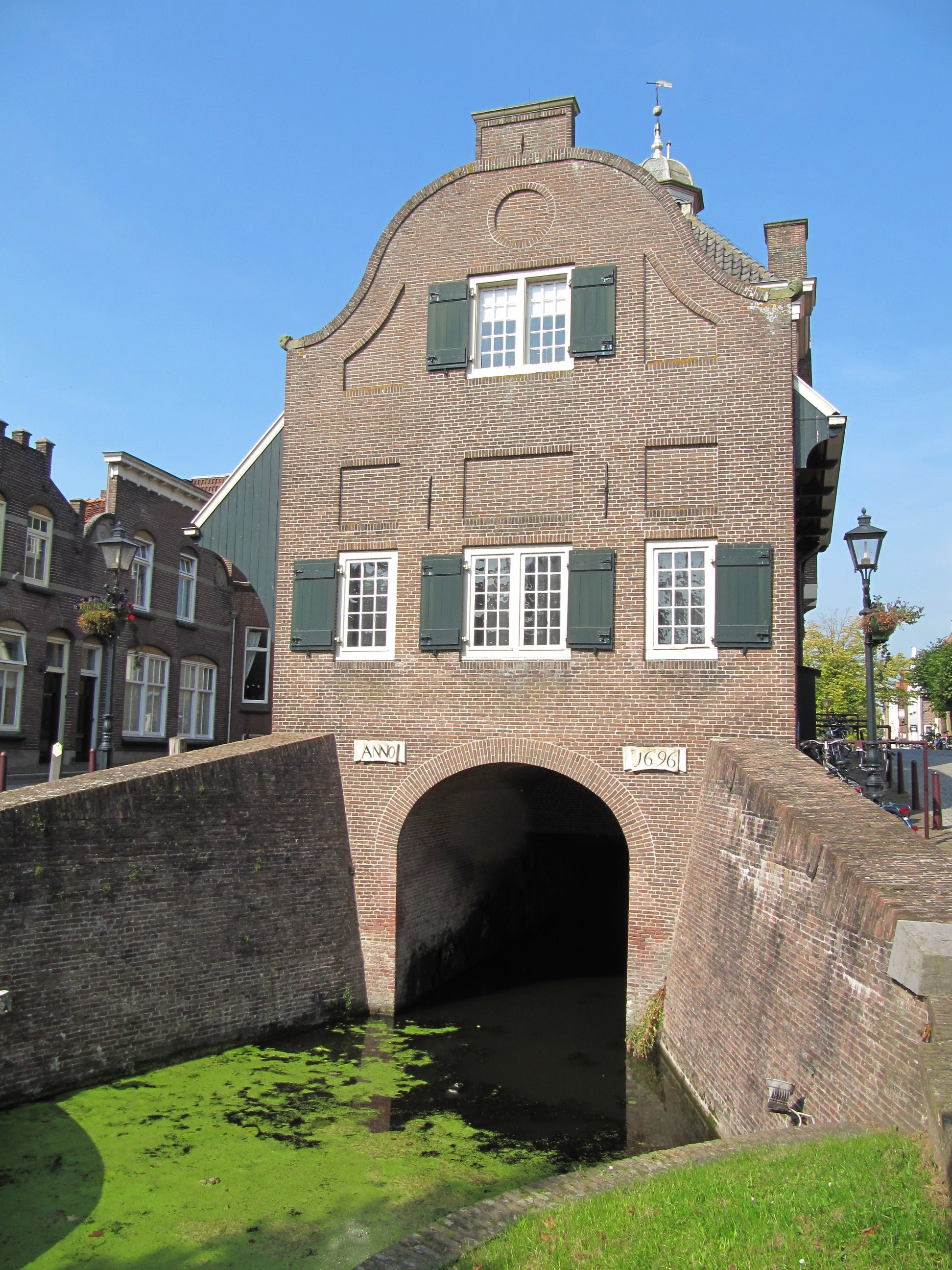 RM30593 Nieuwpoort - Hoogstraat 53.jpg